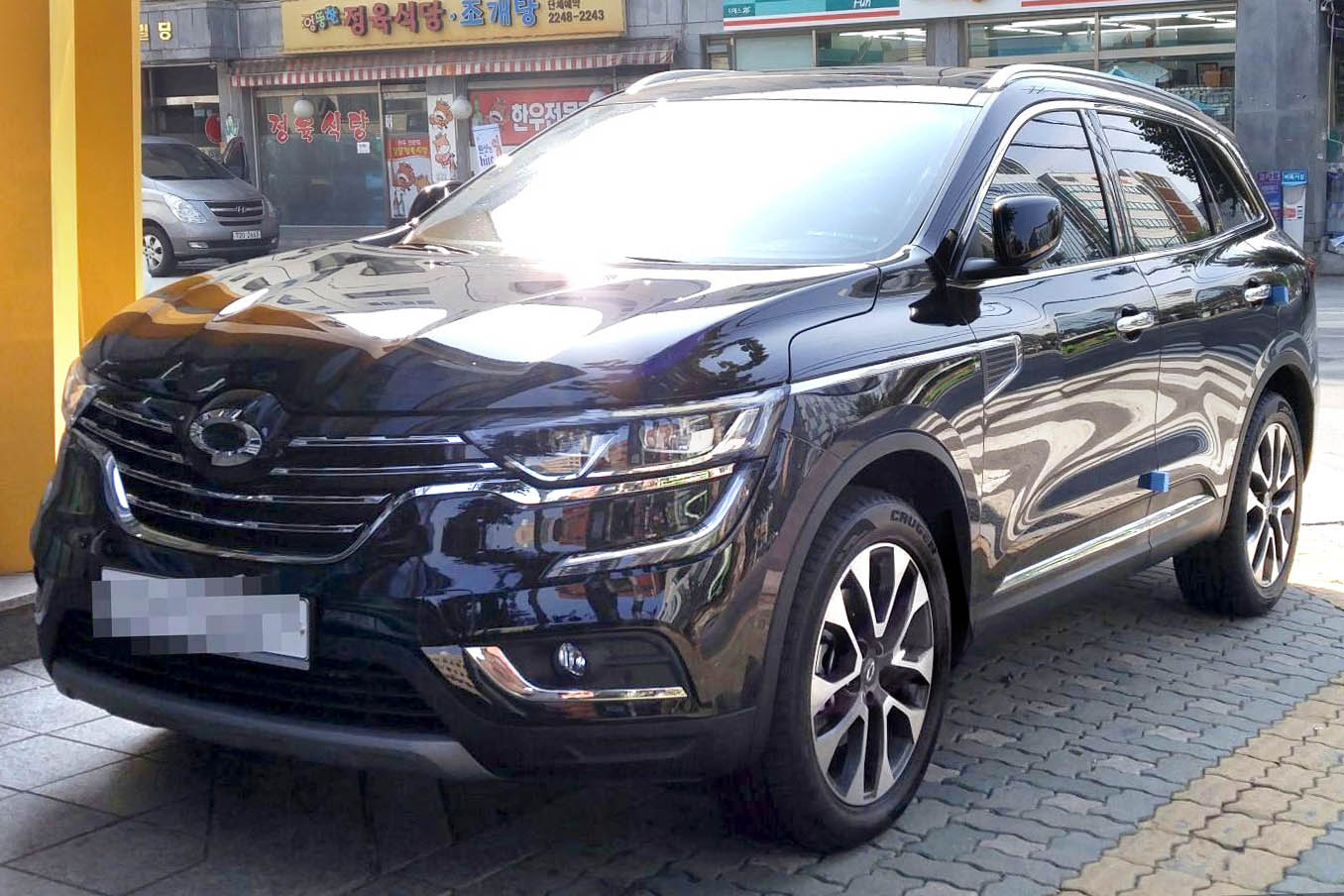 ルノーサムスン・QM6